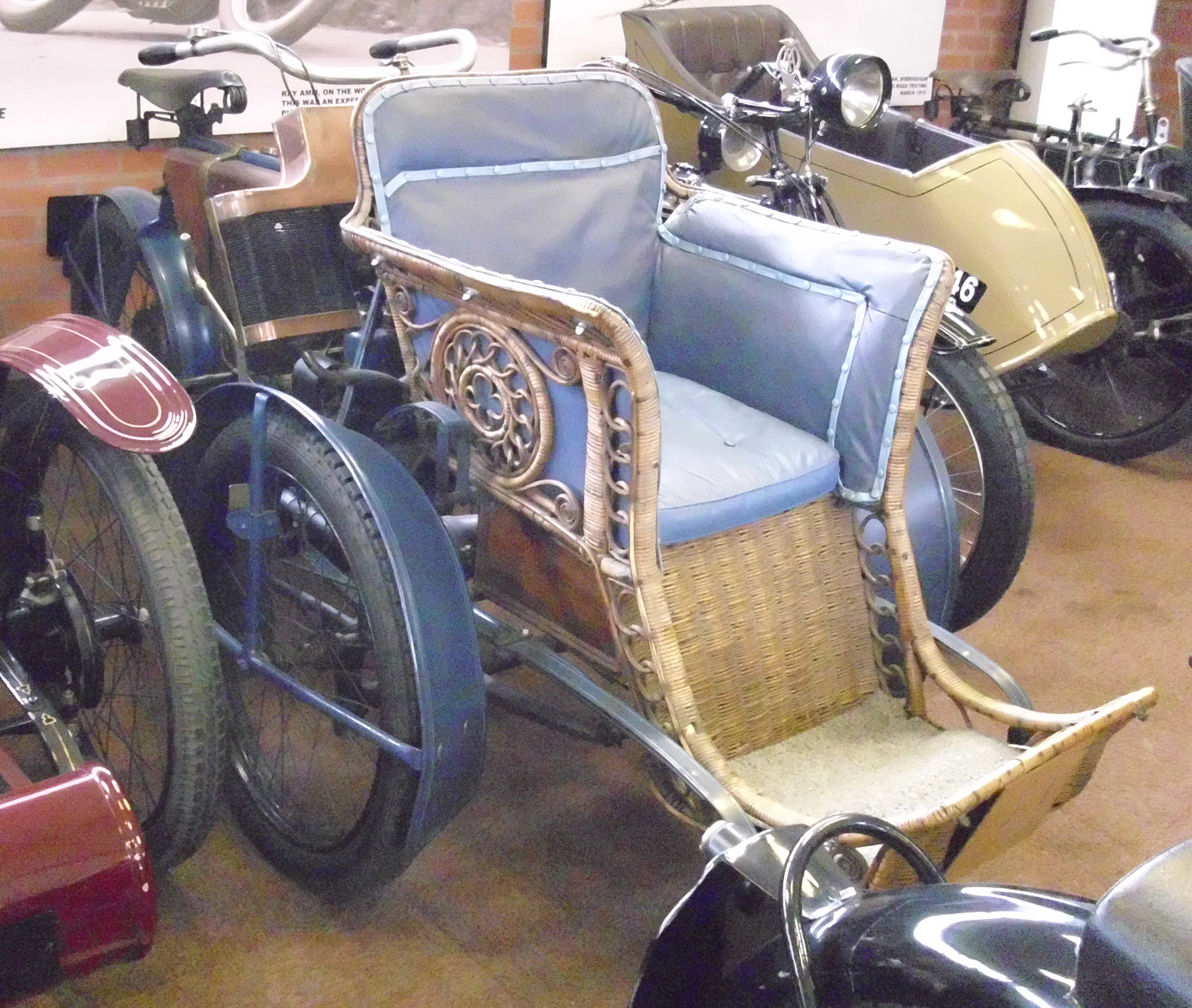 Garrard Forecar 1904